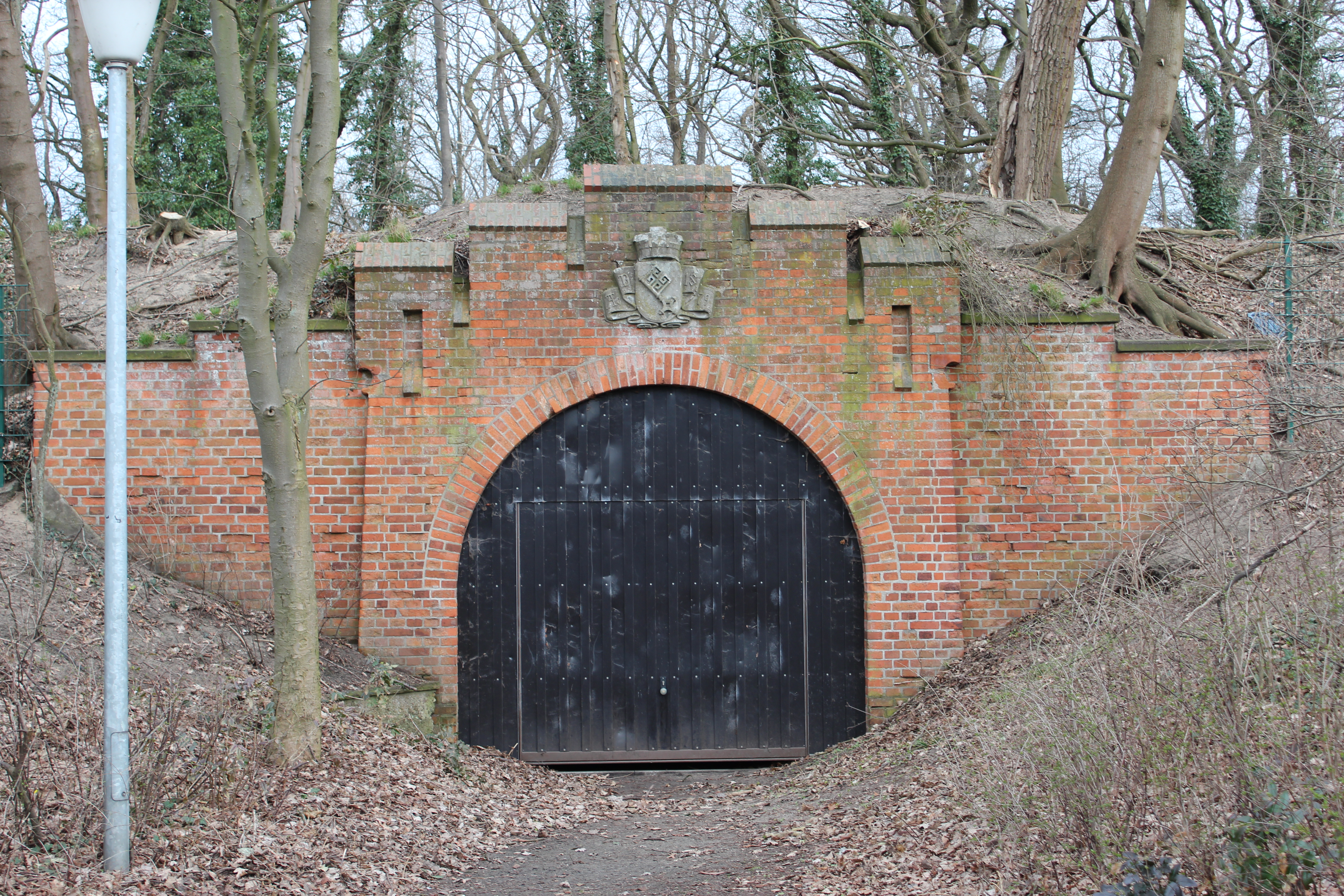 Pulvermagazin in Bremen, An der Fuchtelkuhle 13/15. Die Gesamtanlage ist ein geschütztes Kulturdenkmal in der Freien Hansestadt Bremen, mit der Nr. 1242 beim Landesamt für Denkmalpflege registriert.